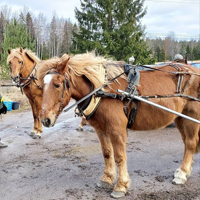 Ohkolan laskiaisriehan 2020 suomenhevosia.